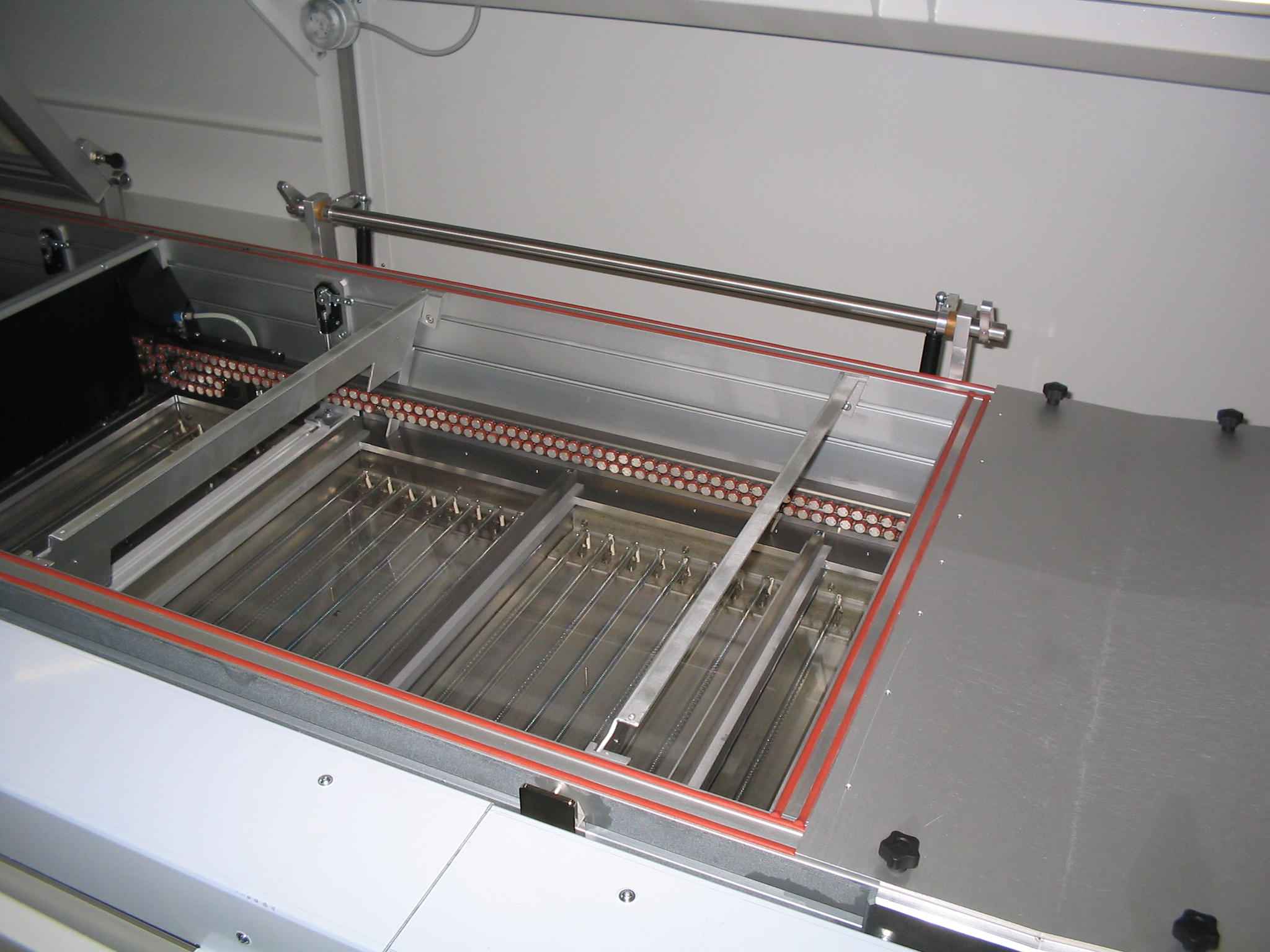 Vorheizung; Wendeln